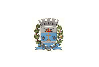 Bandeira de Ubirajara - SP - Brasil.